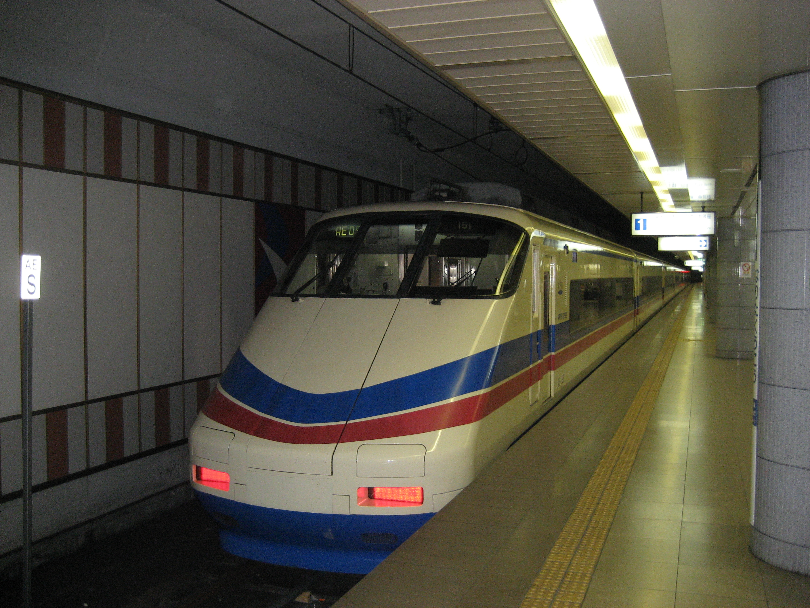 Keisei AE-100 Skyliner at Narita Airport Station.